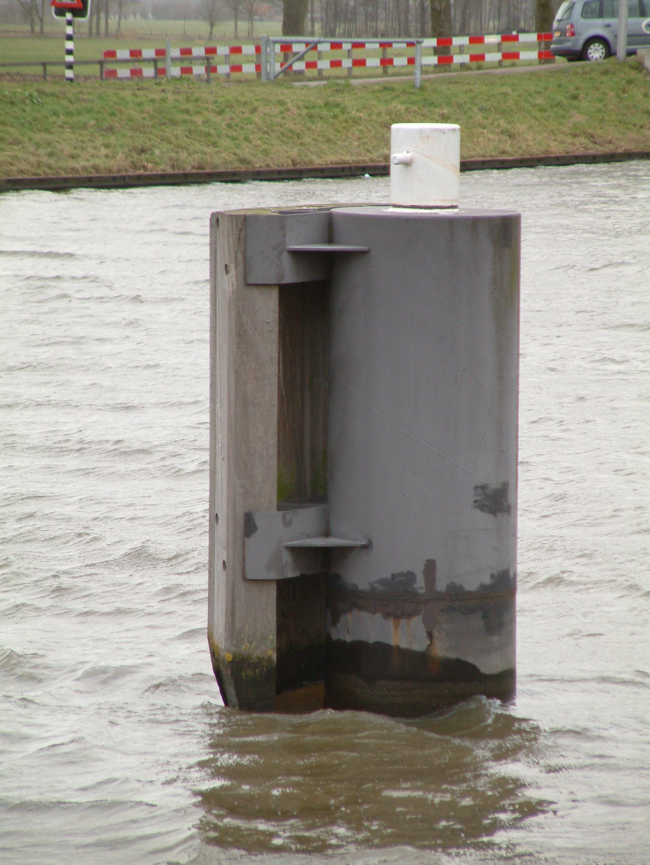 Moderne stalen dukdalf in het Merwedekanaal bij Gorinchem